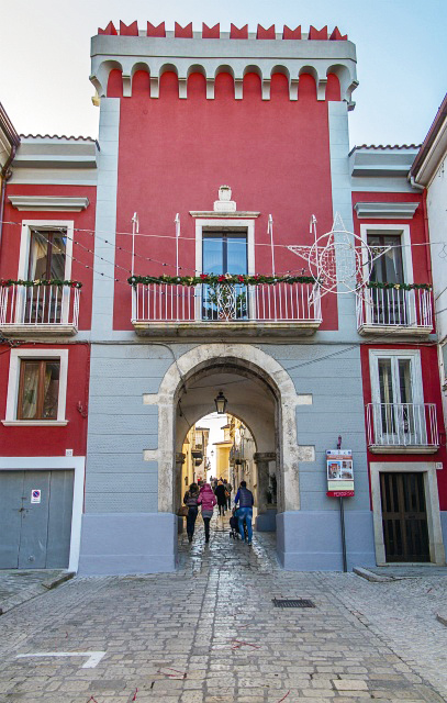 Il centro storico di San Marco dei Cavoti (BN)